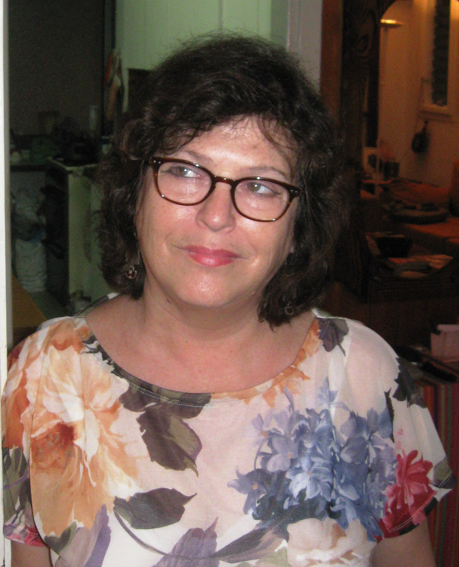 תצלום ביתי אישי מיועד לדף הפרסום בויקיפדיה